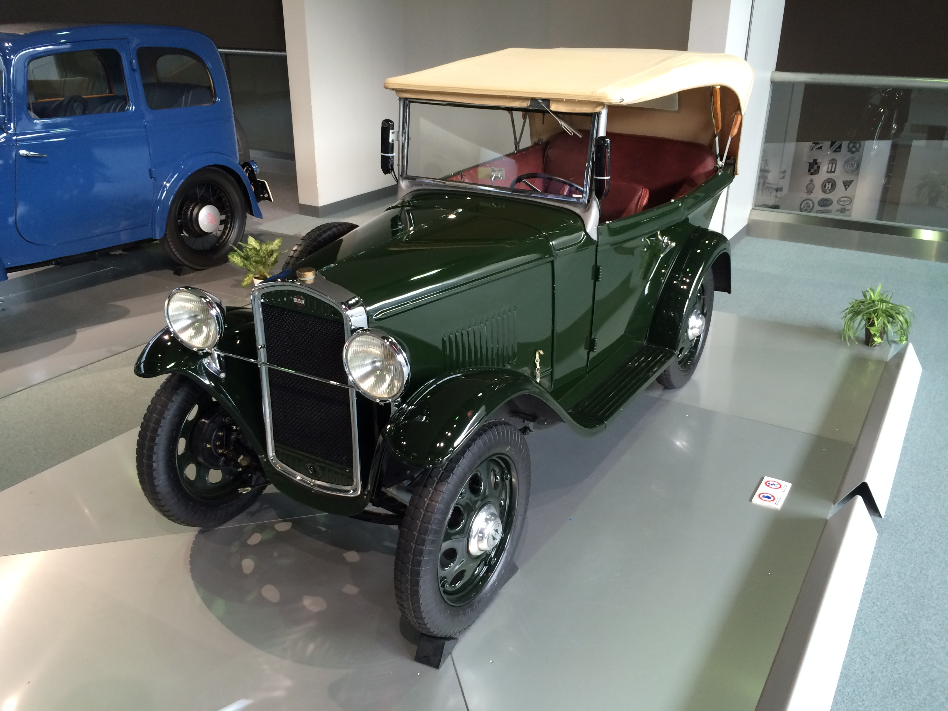 Datsun Model 11 Phaeton (1932, Japan)